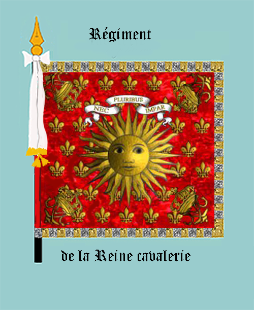 Standarte des Kavallerieregiments „la Reine“ Königreich Frankreich (Vorderseite)